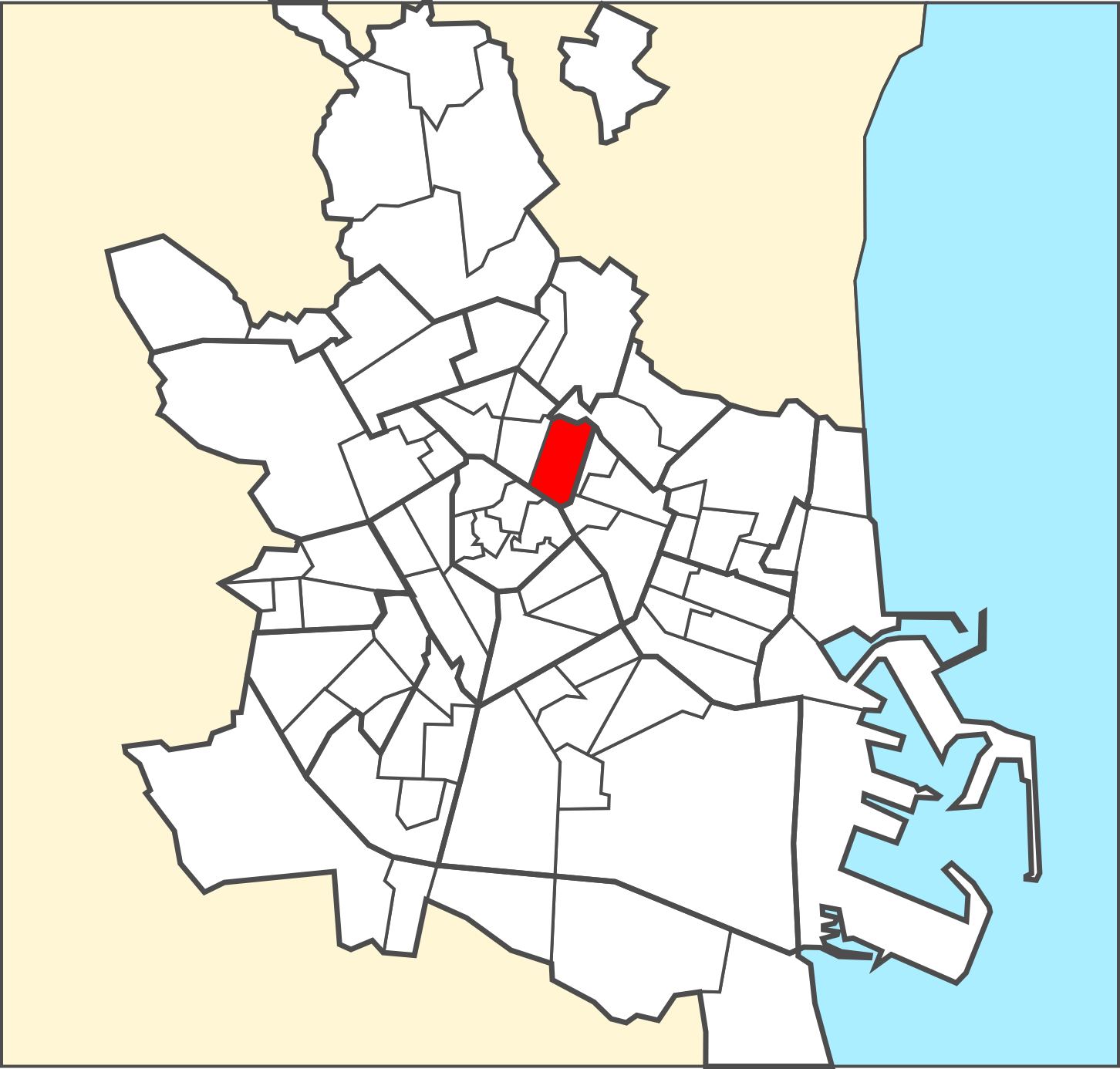 Localització del barri dins de la ciutat de València.